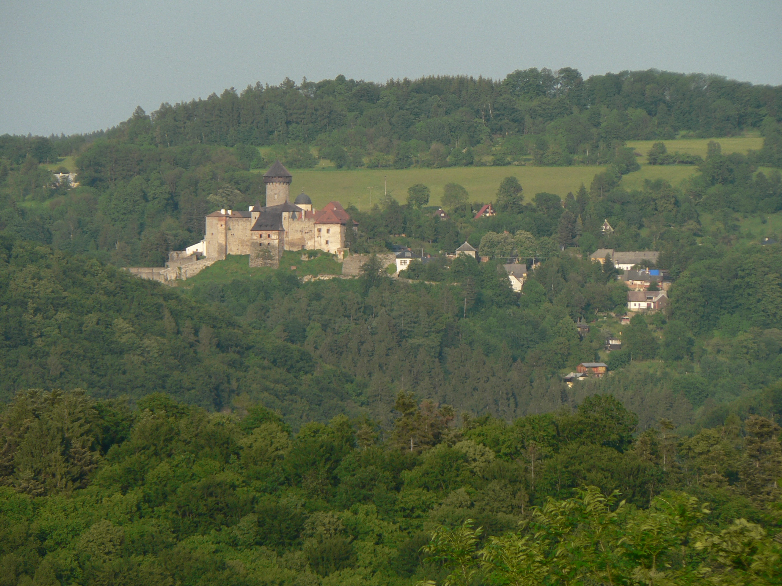 Pohled na obec s hradem od západu.